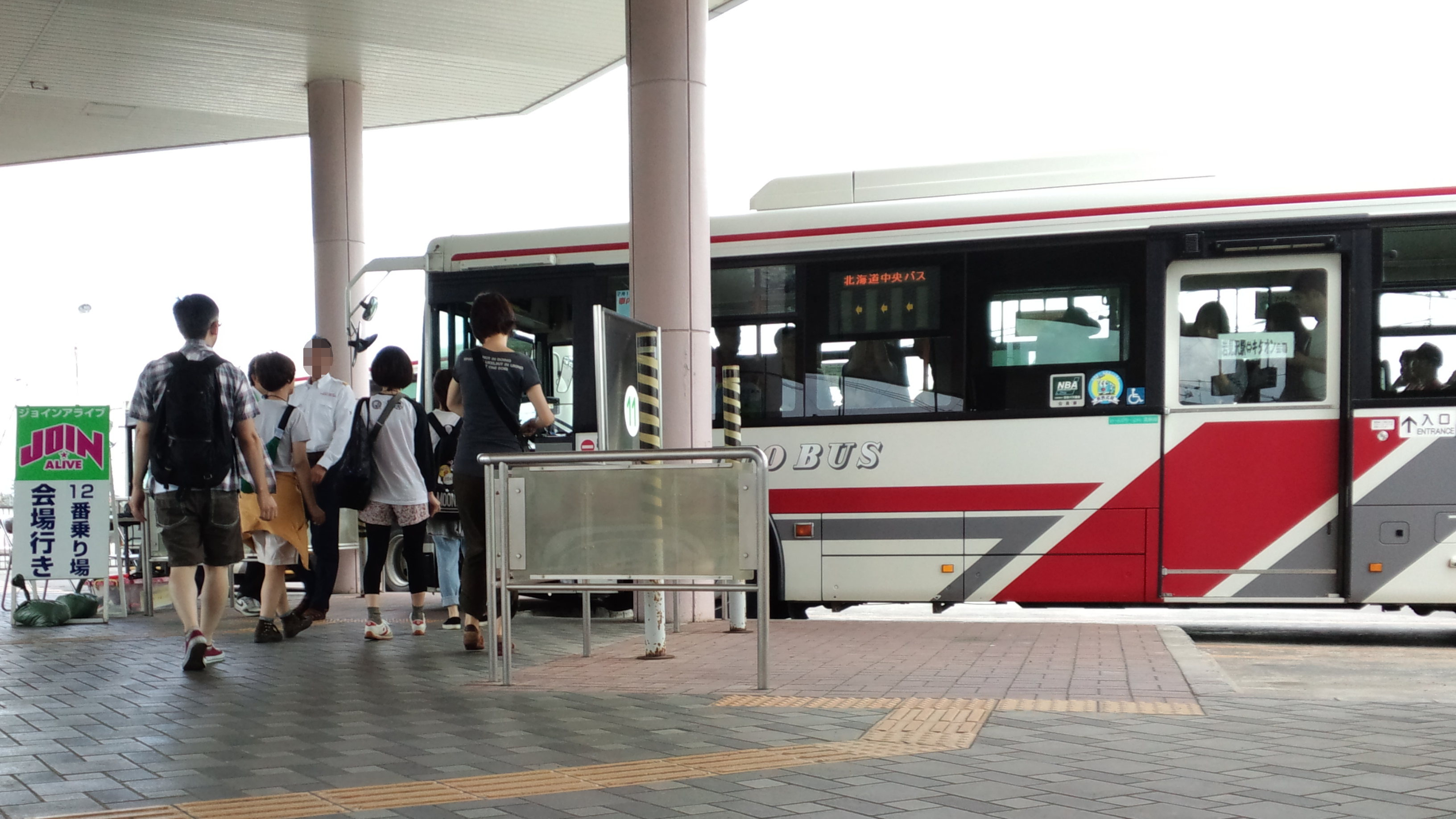 北海道中央バス・JOIN ALIVE臨時便 岩見沢ターミナル→会場